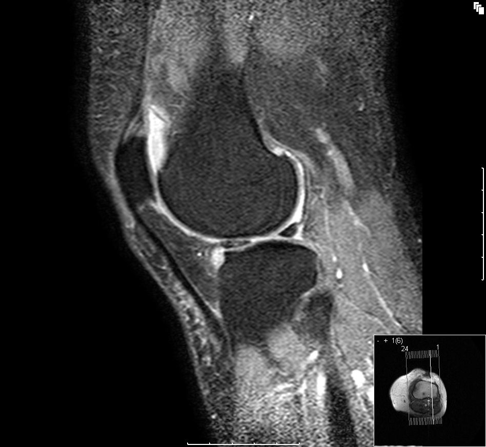 Bildbeschreibung: Gonarthrose, Ergussbildung, Femoropatellararthrose Quelle: eigene Aufnahme Datum: Autor: User:Scuba-limp